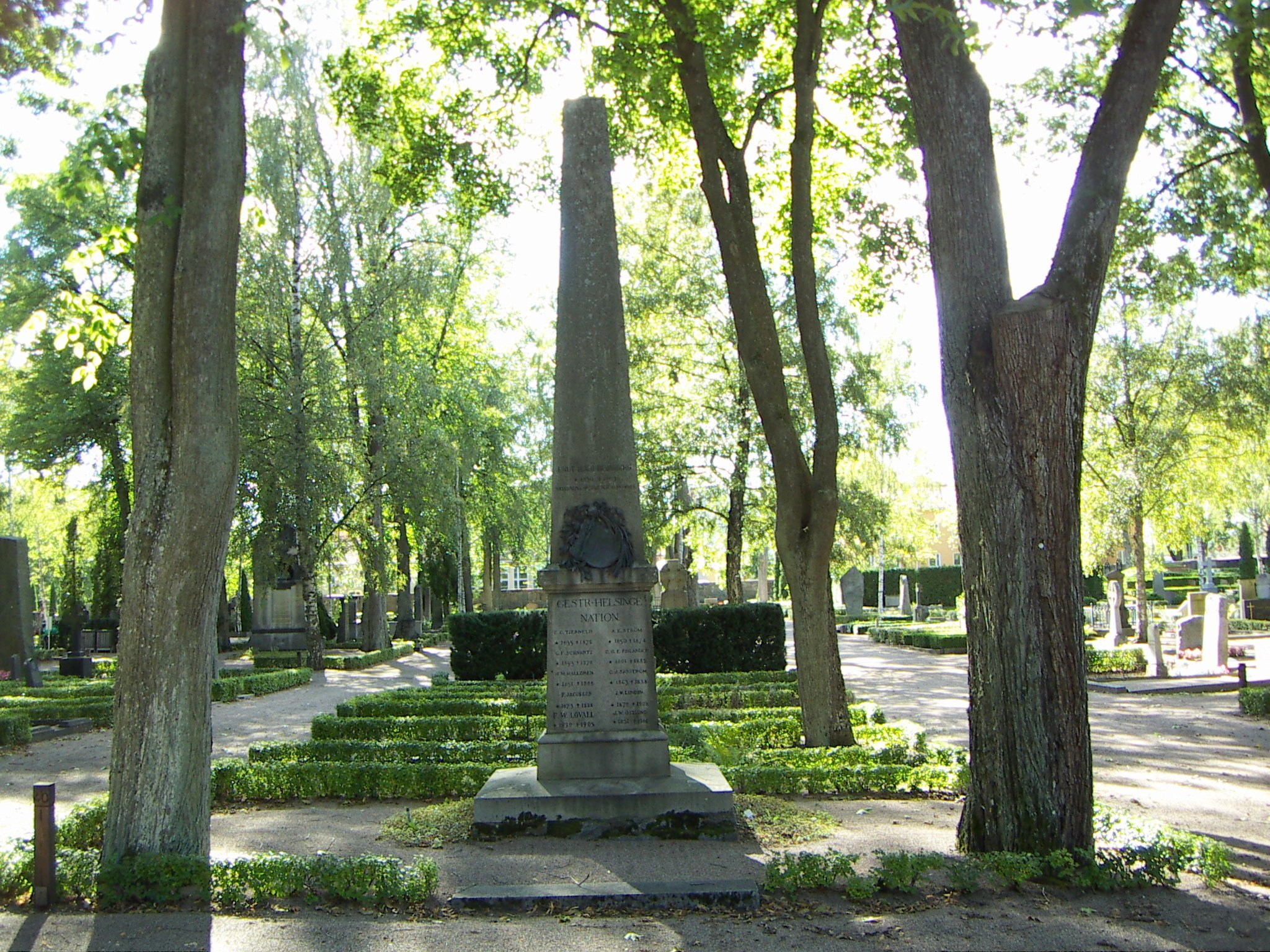 Gästrike-Hälsingenations grav på Uppsala gamla kyrkogård.